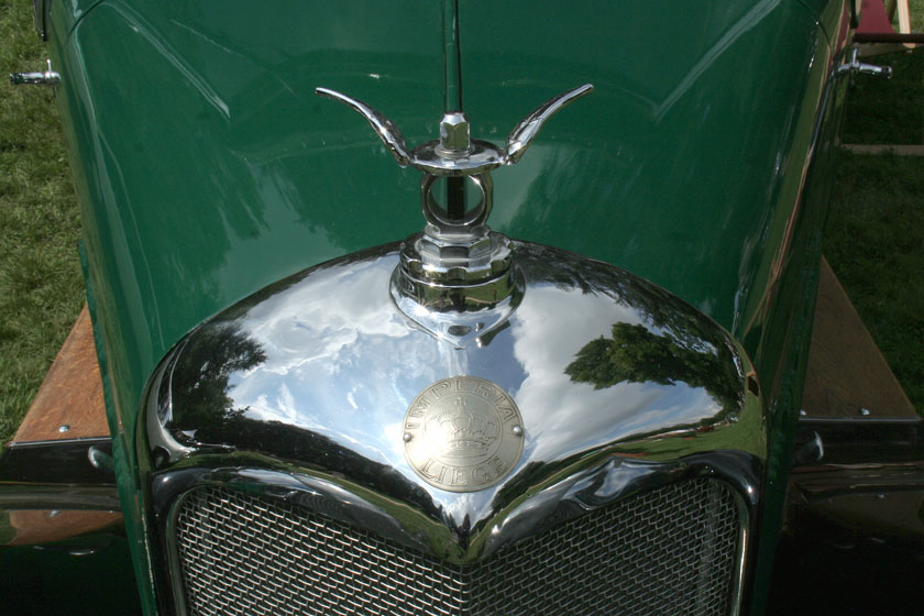 1929 Imperia 5-25 HP Cabrio_IMG_7547